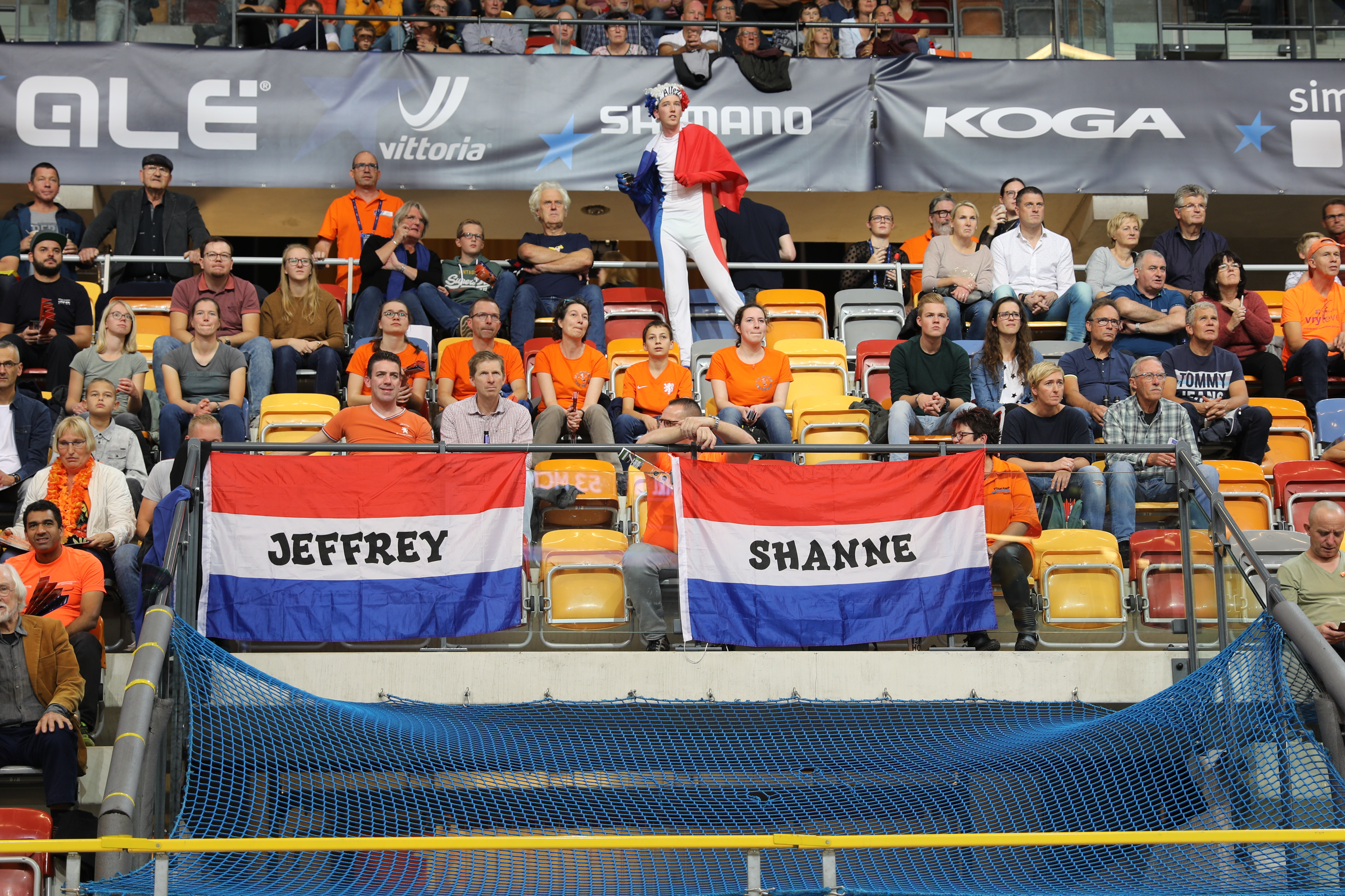 Tribüne mit Publikum